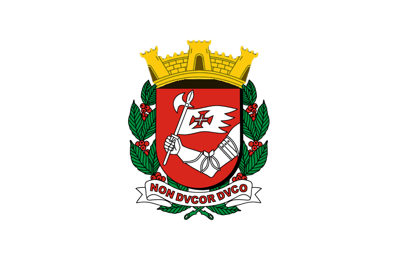 Bandeira da cidade de São Paulo (1950 - 1974).